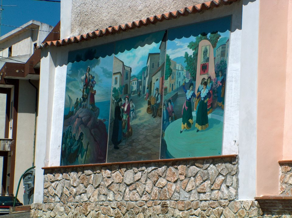 Murales centro storico San Giorgio Albanese